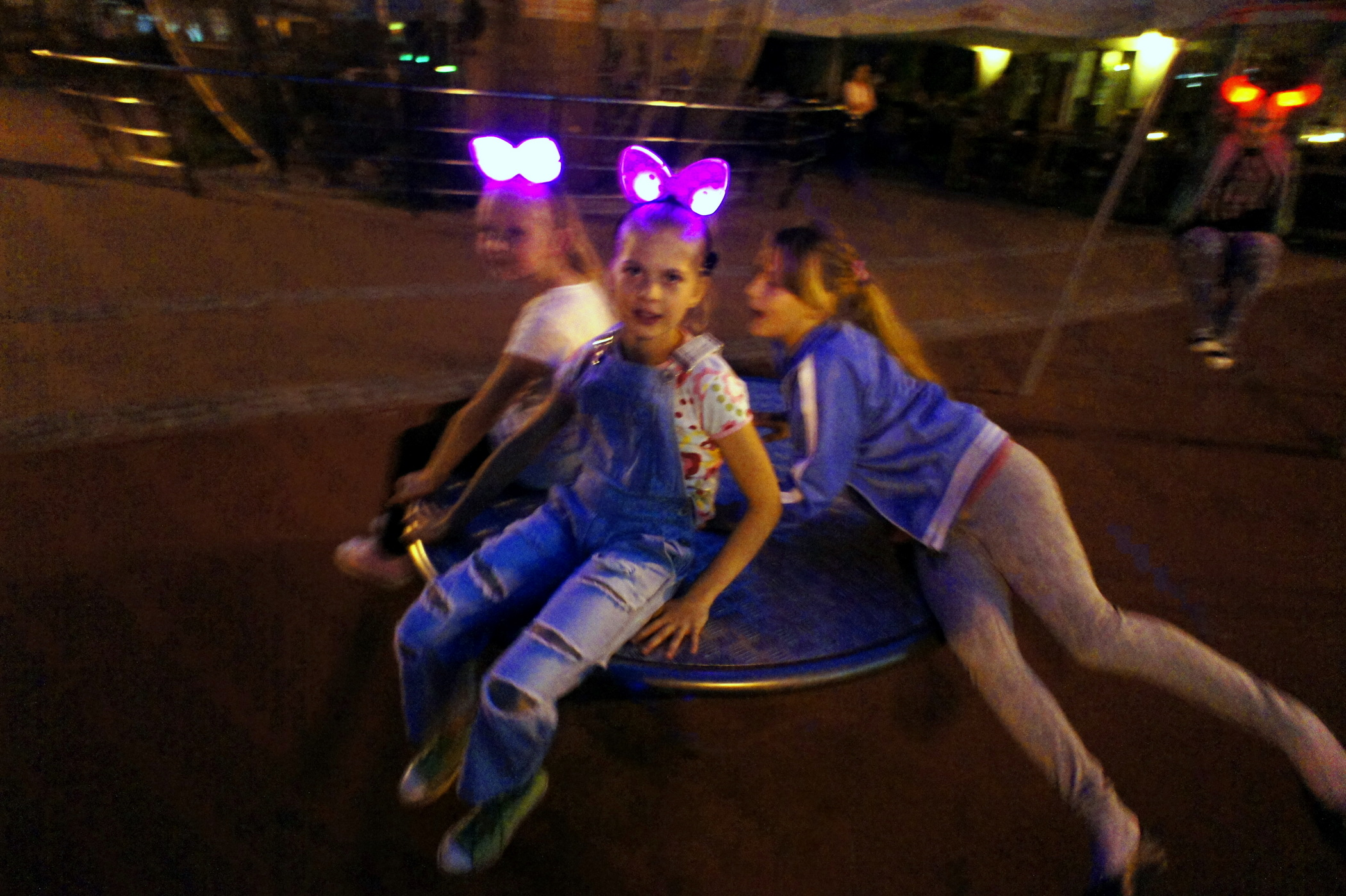 Gorzów Wlkp. Plac zabaw na bulwarze nadwarciańskim.